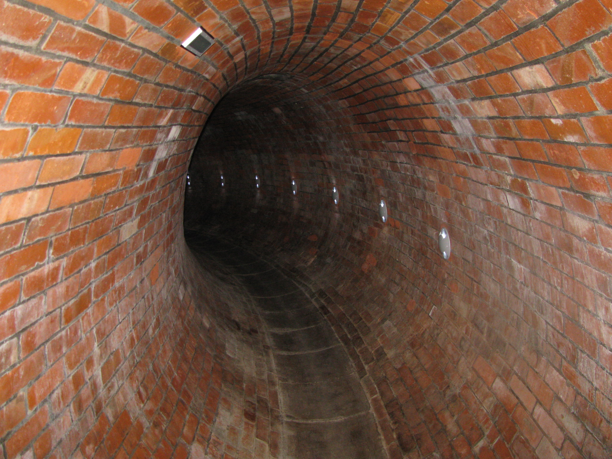 Muzeum Kanału Dętka w Łodzi